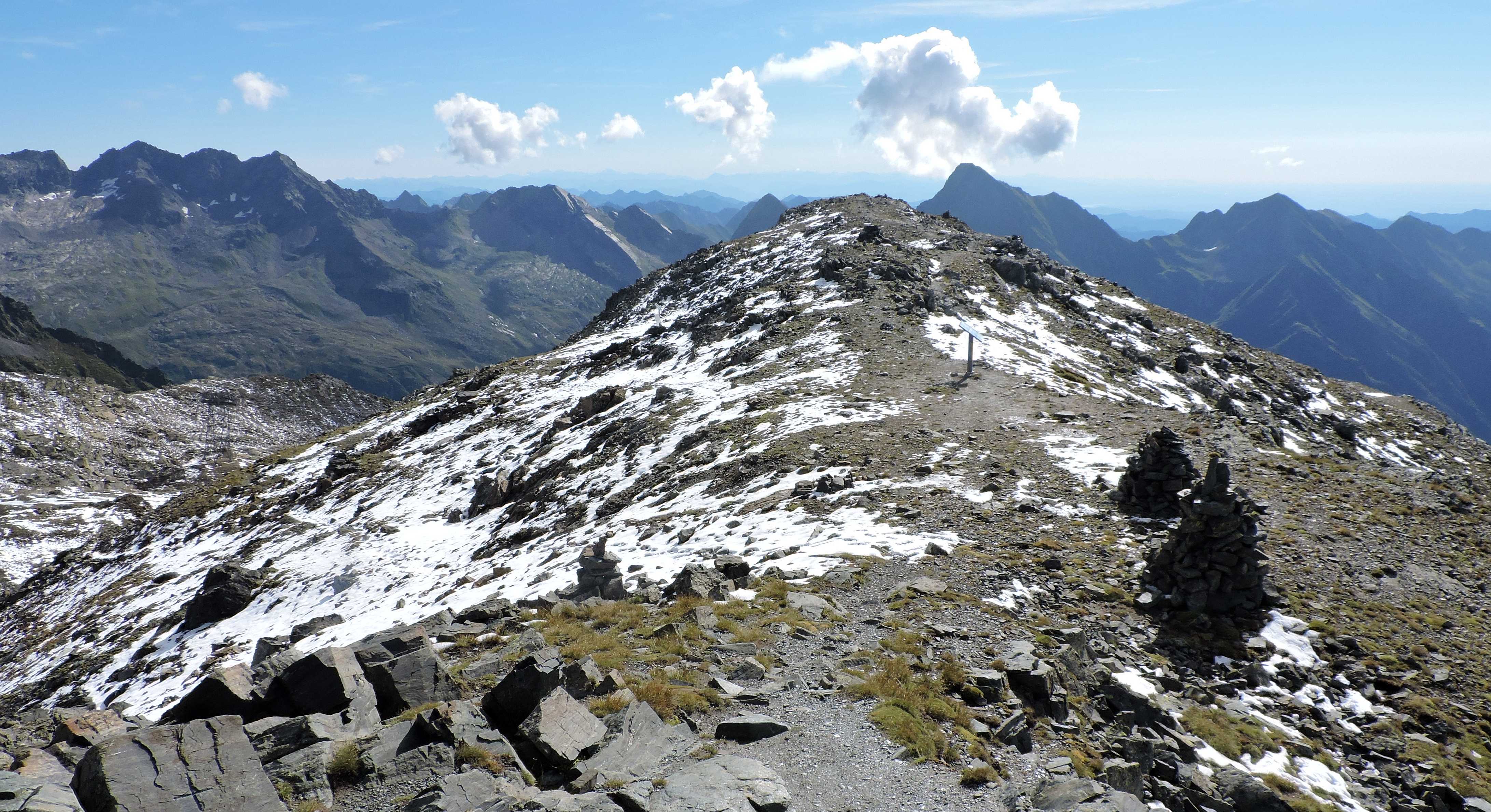 Corno del Camoscio (Alpi Pennine): zona sommitale